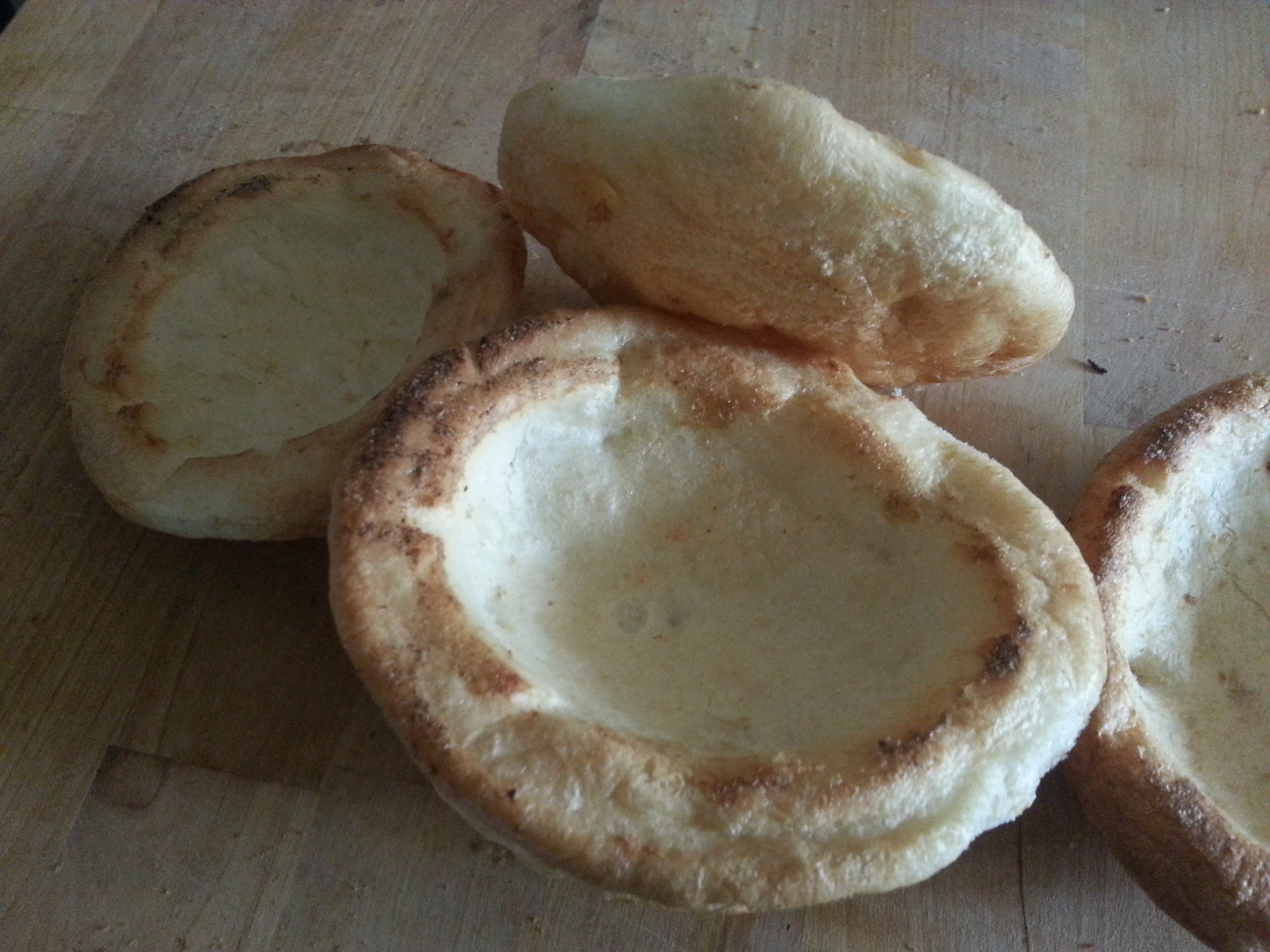 Biscuit a pâte échaudé, que l'on trouve au nord de l'Ille-et-Vilaine et dans l'est des Côtes-d'Armor.